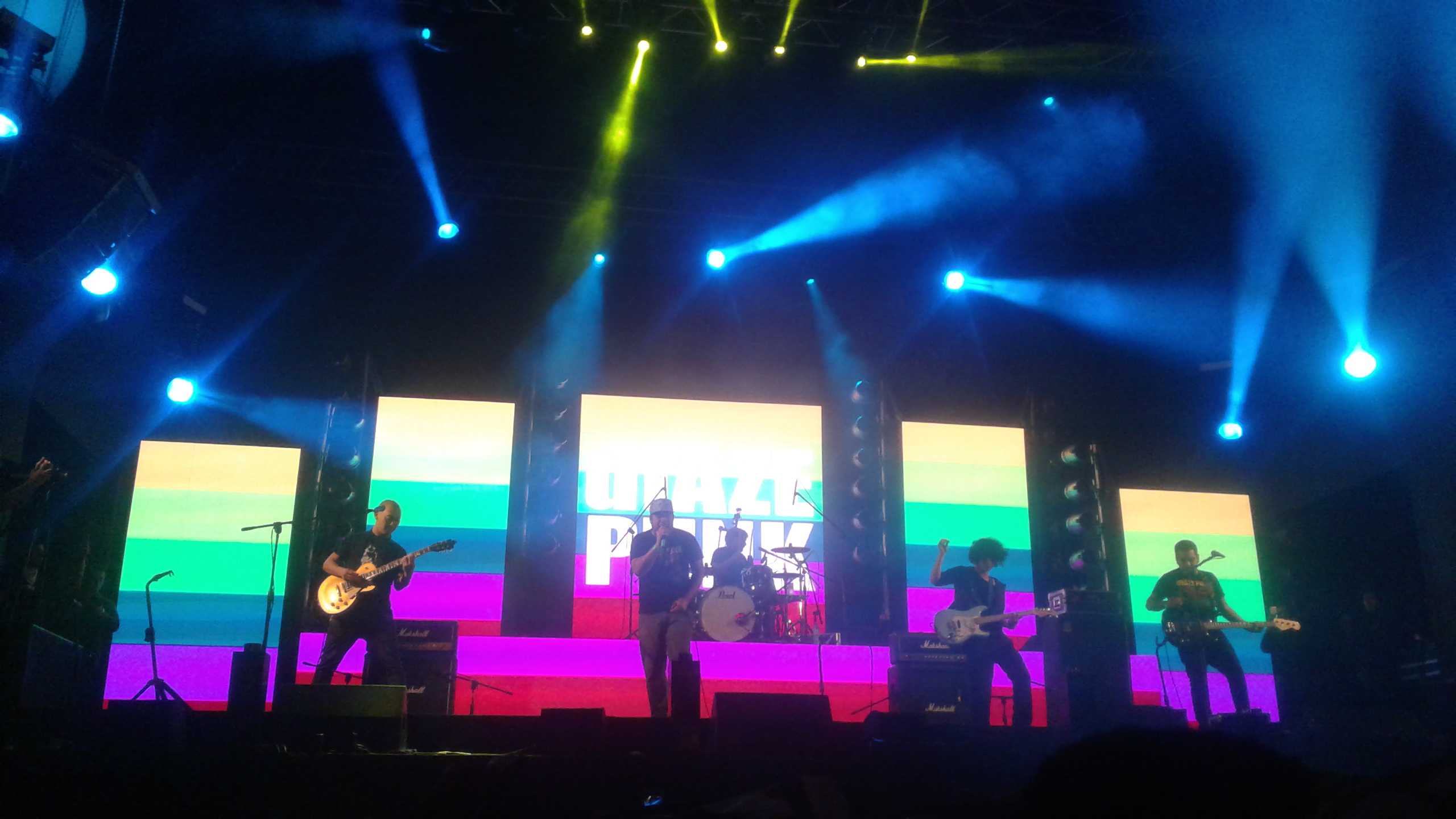 dIAZEPUNK tocando "Parte de mi historia" en el Día del Rock Peruano.